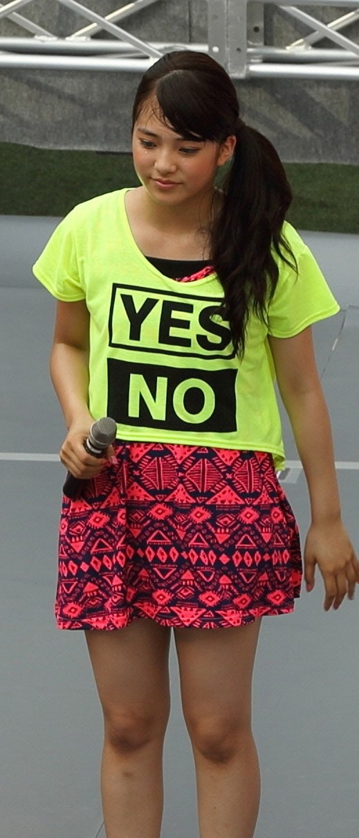 たまプラーザテラス フェアリーズ x ジュエルペット ミニライブ